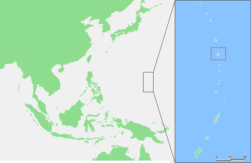 Mariana Islands - Pagan.PNG